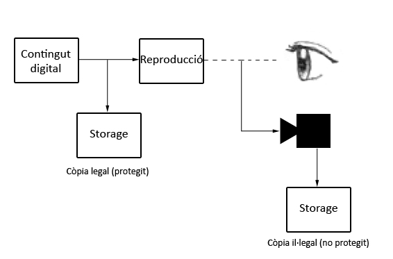 Esquema del procés del forat analògic.